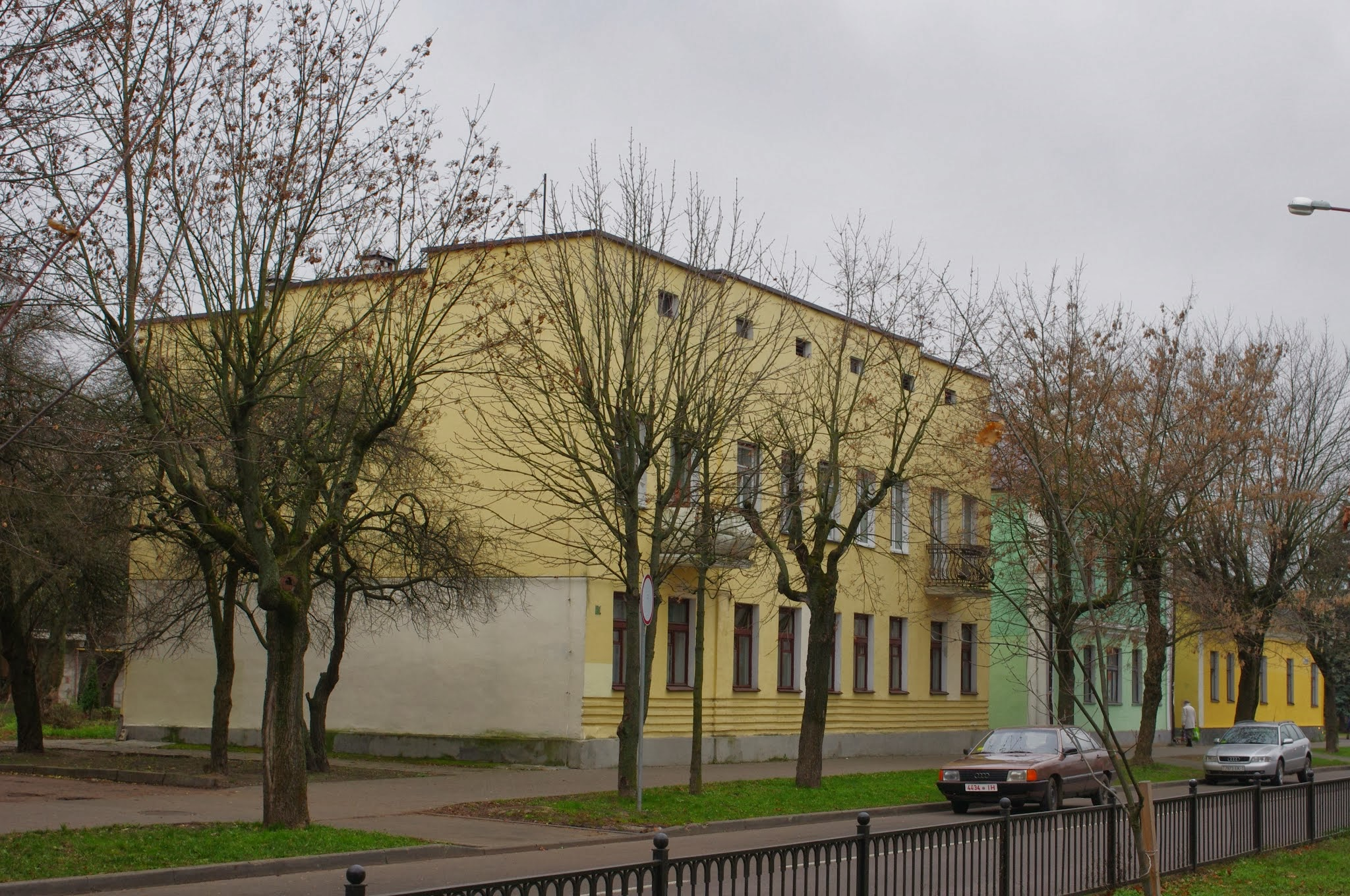 Lieninski rajon, Brest, Belarus